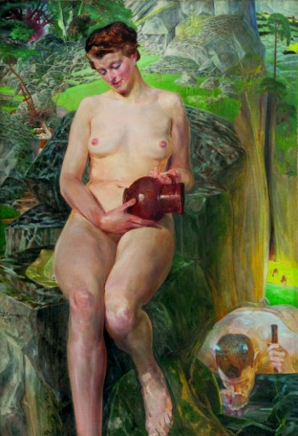 Jacek Malczewski (1854-1929) – Maria Bal (Balowa) née Brunicka.